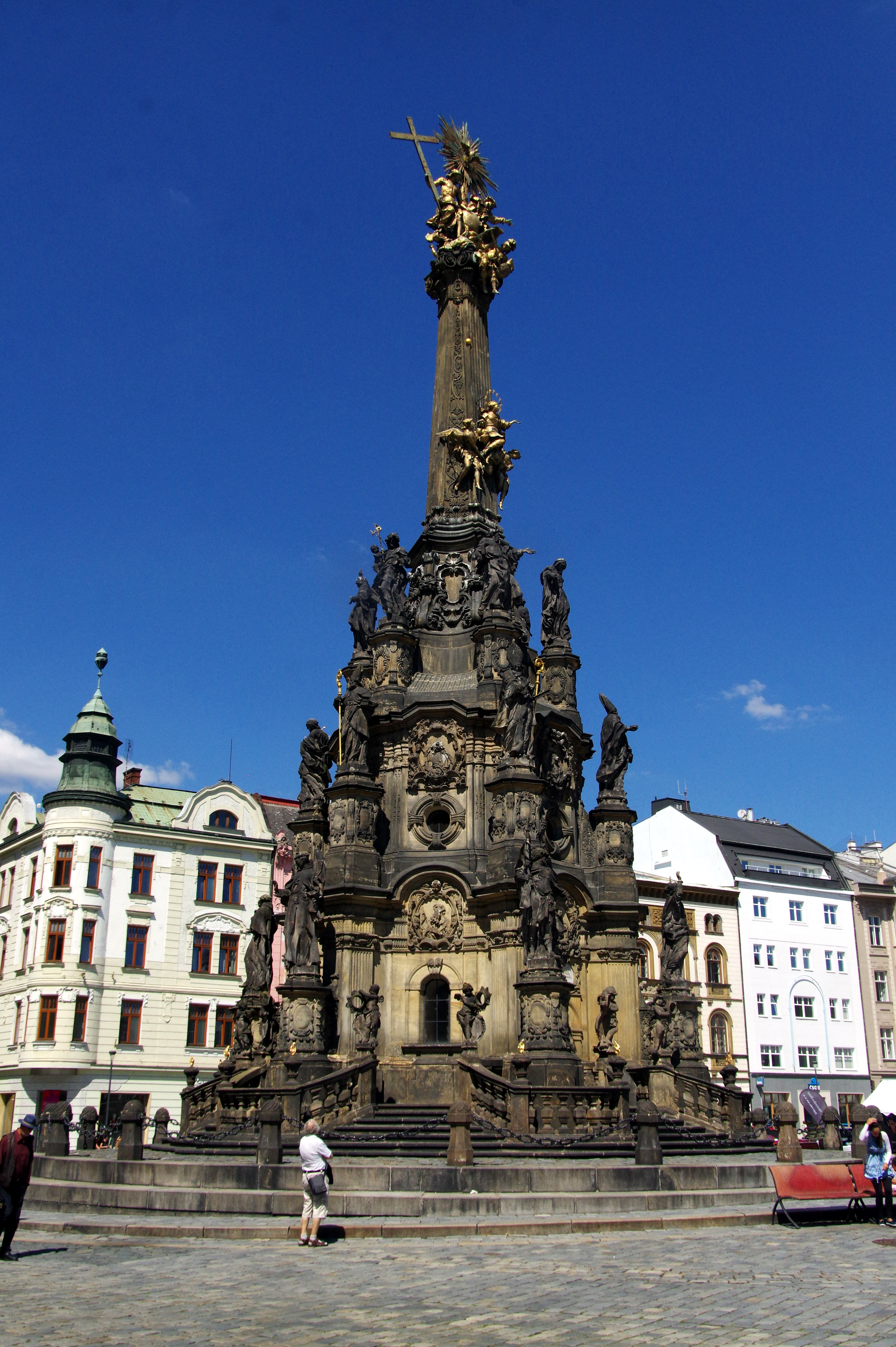 8.8.17 2 Olomouc 071